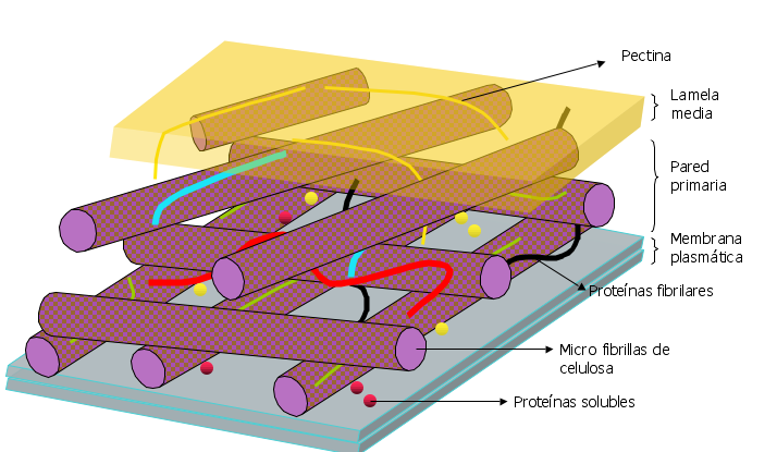 Esquema de la pared celular vegetal. Cell wall scheme